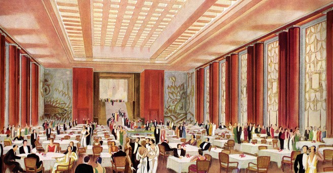 Atlantique salons classe1